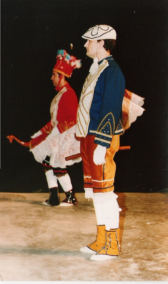 Imagen de un dantzari